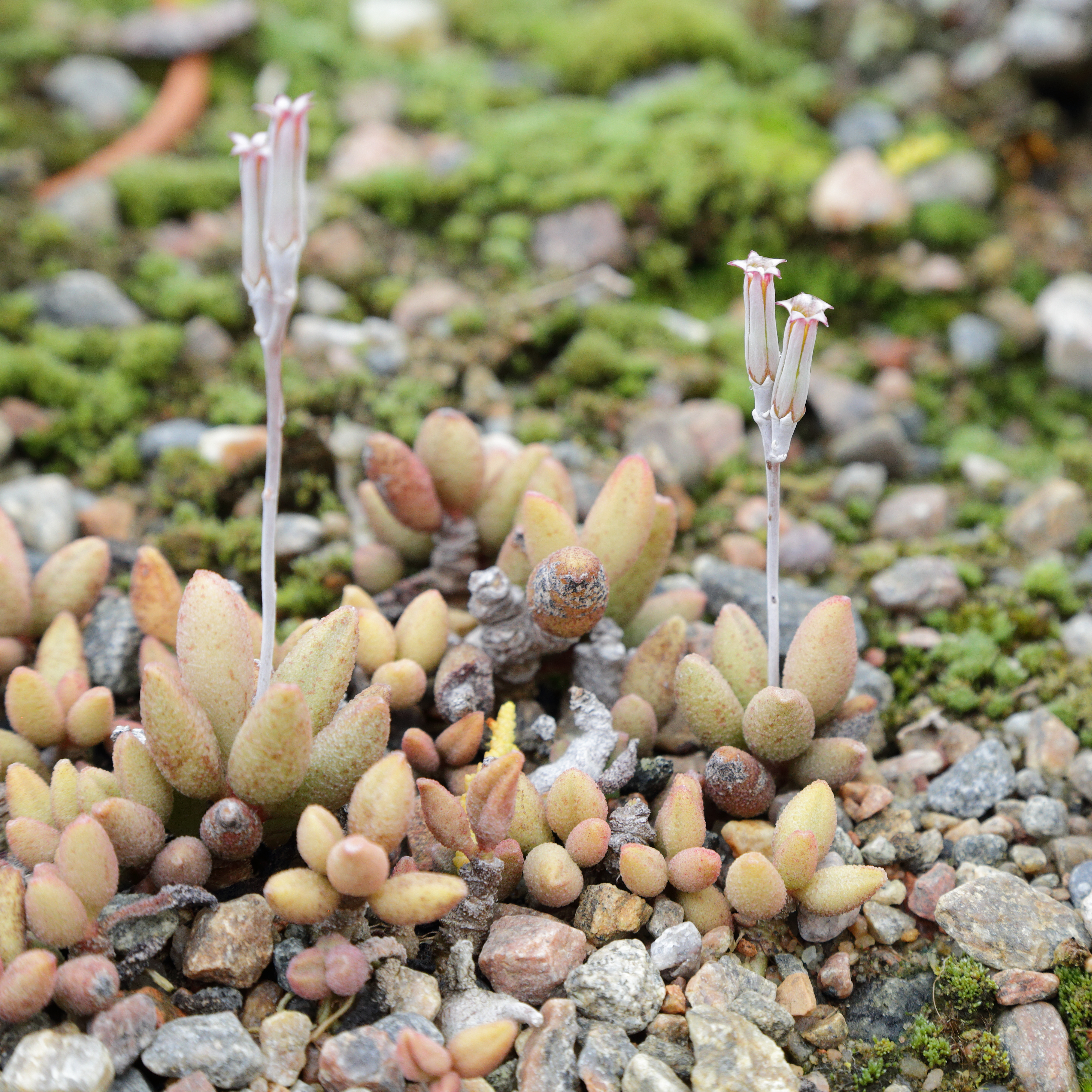 Adromischus marianae i Göteborgs botaniska trädgård.